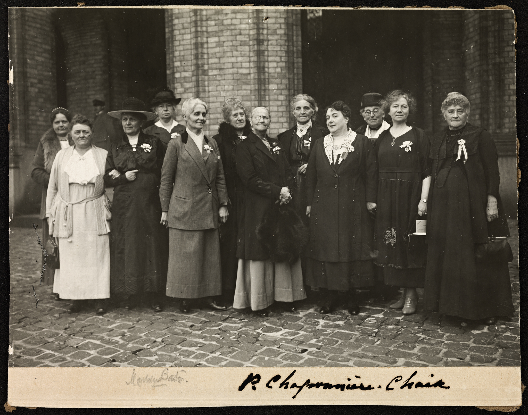 Tittel / Title: Det internasjonale kvinneråds møte, Stortinget Beskrivelse / Description: Pauline Chaponnière-Chaix var president for ICW fra 1920-1922. Dato / Date: ca 1920 Fotograf / Photographer: ukjent / unknown Sted / Place: Oslo, Stortinget Eier / Owner Institution: Nasjonalbiblioteket / National Library of Norway Lenke / Link: Bildesignatur / Image Number: blds_05884